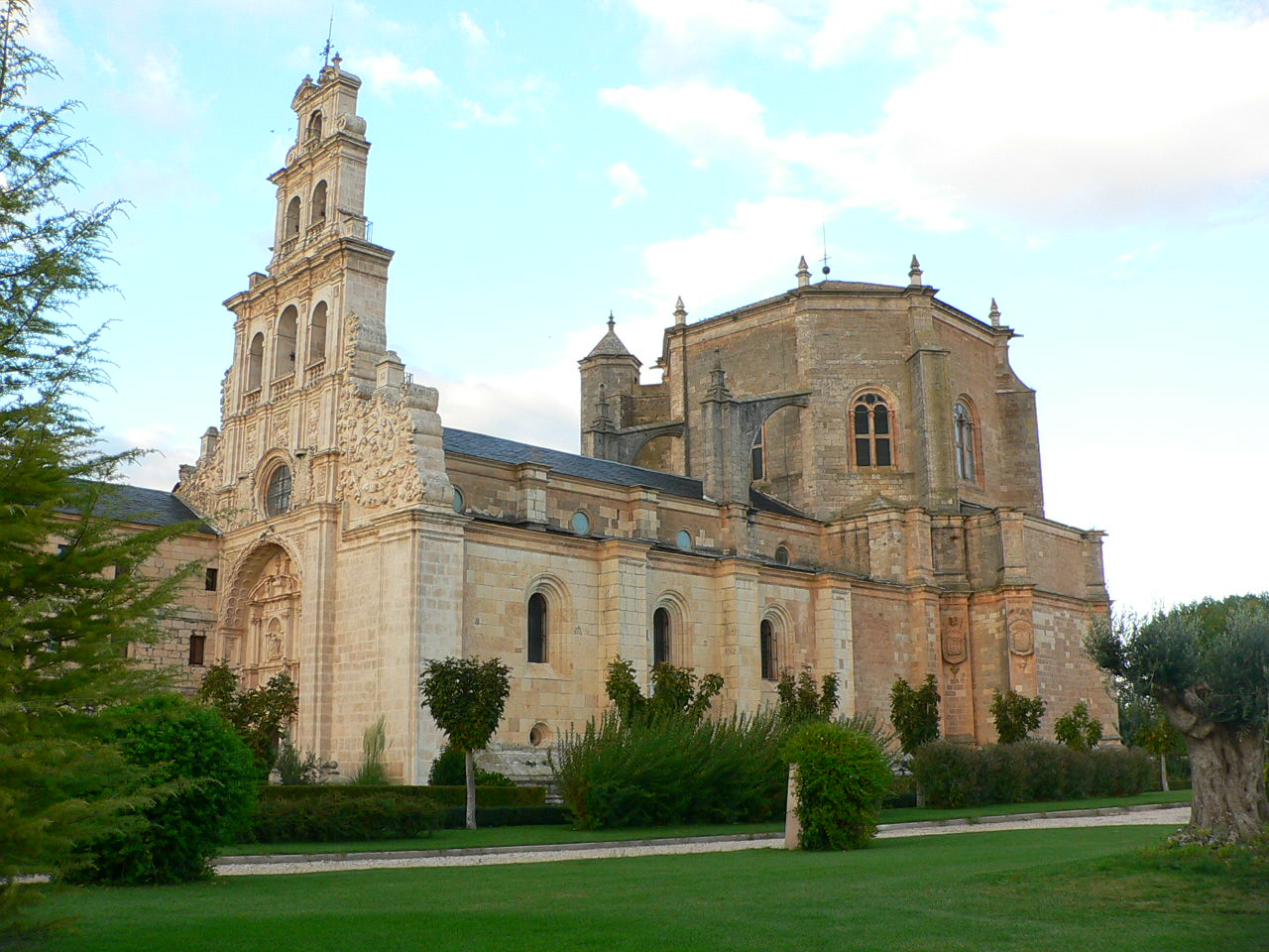 Monasterio de La Vid / La Vid Monastery, Burgos, Spain